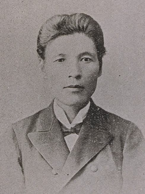 下条正雄（1848～1920）